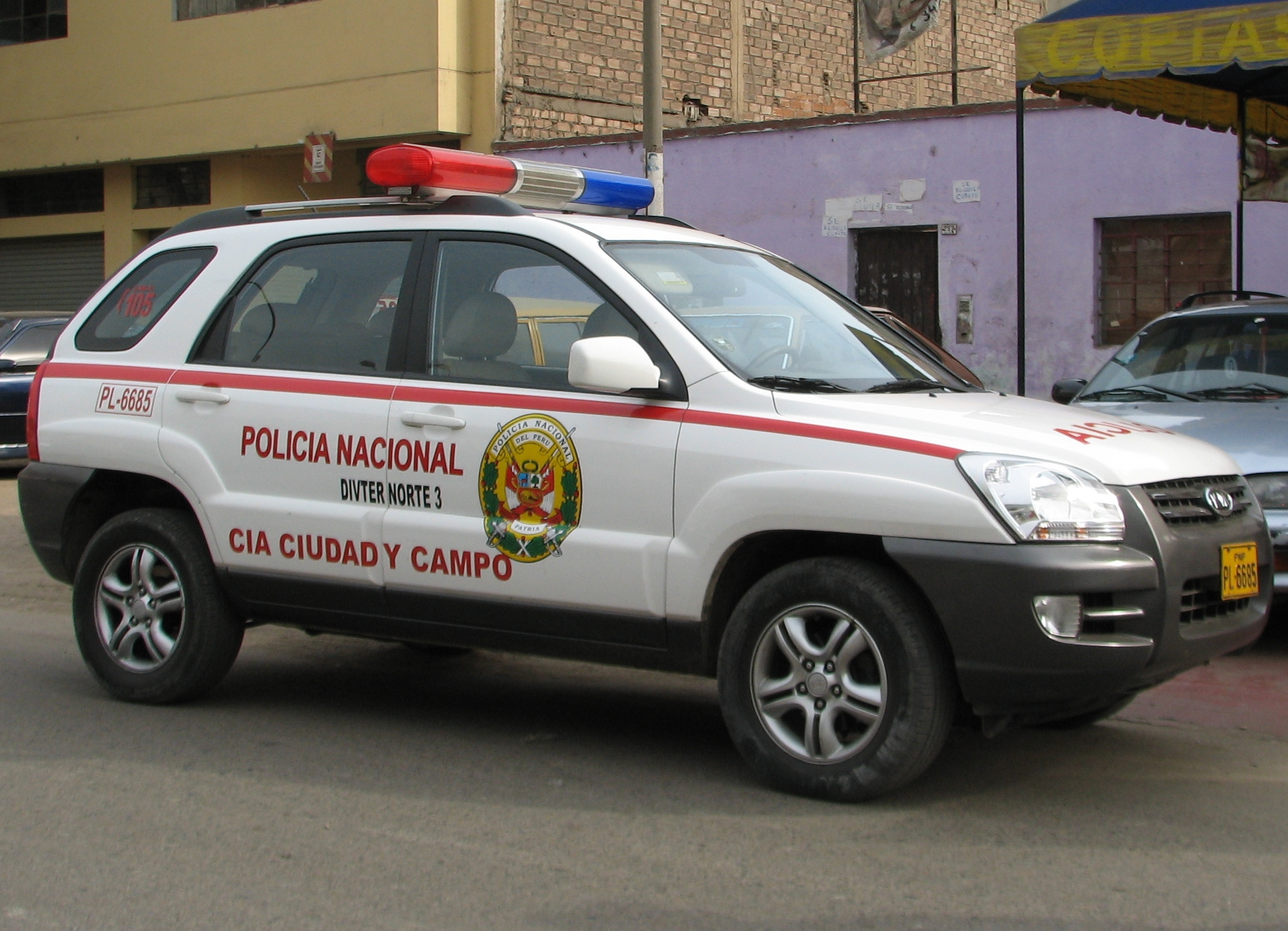 Police car, Kia Sportage JE, Ciudad y Campo, Rímac/Lima, Peru